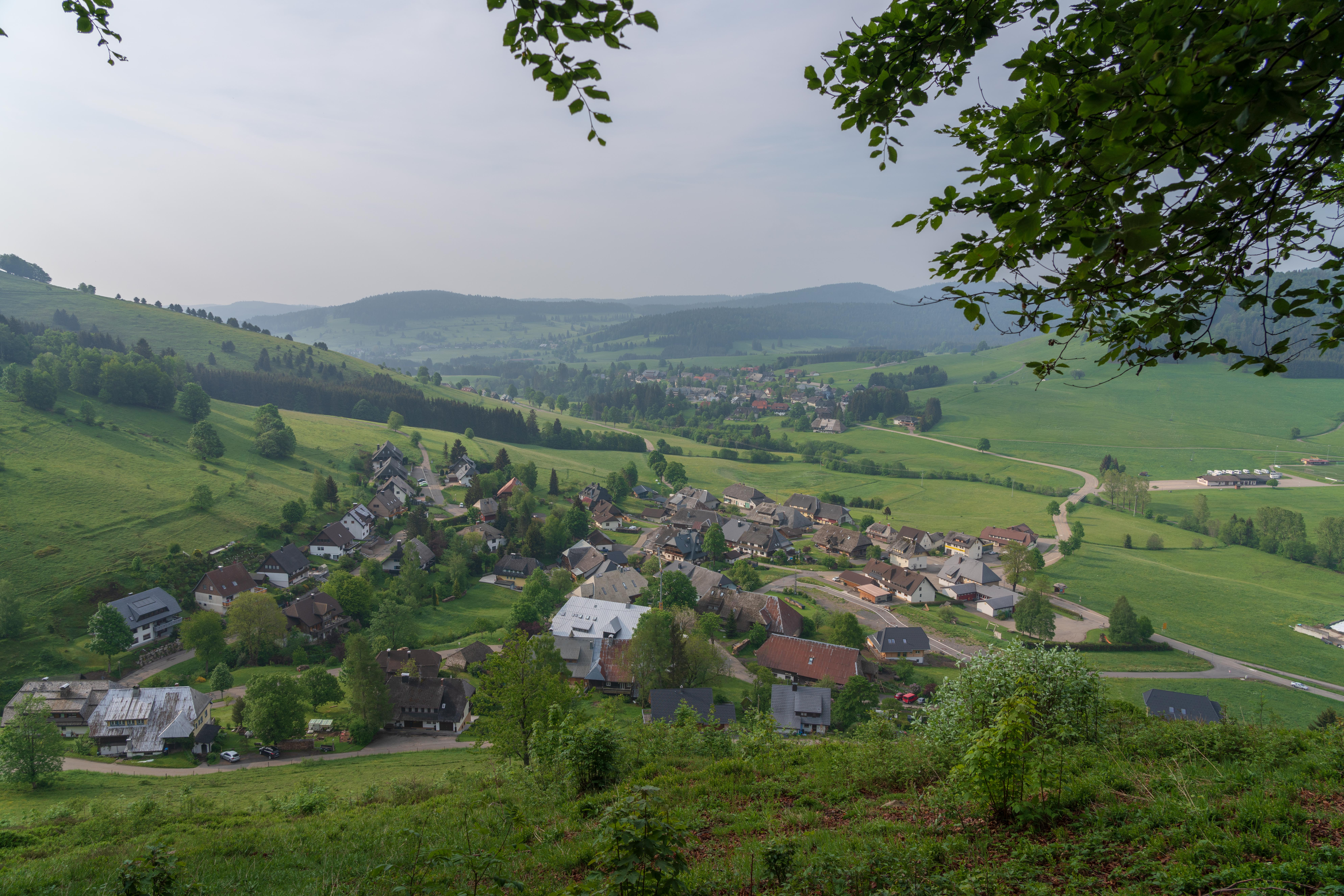 Blick auf Bernau-Dorf